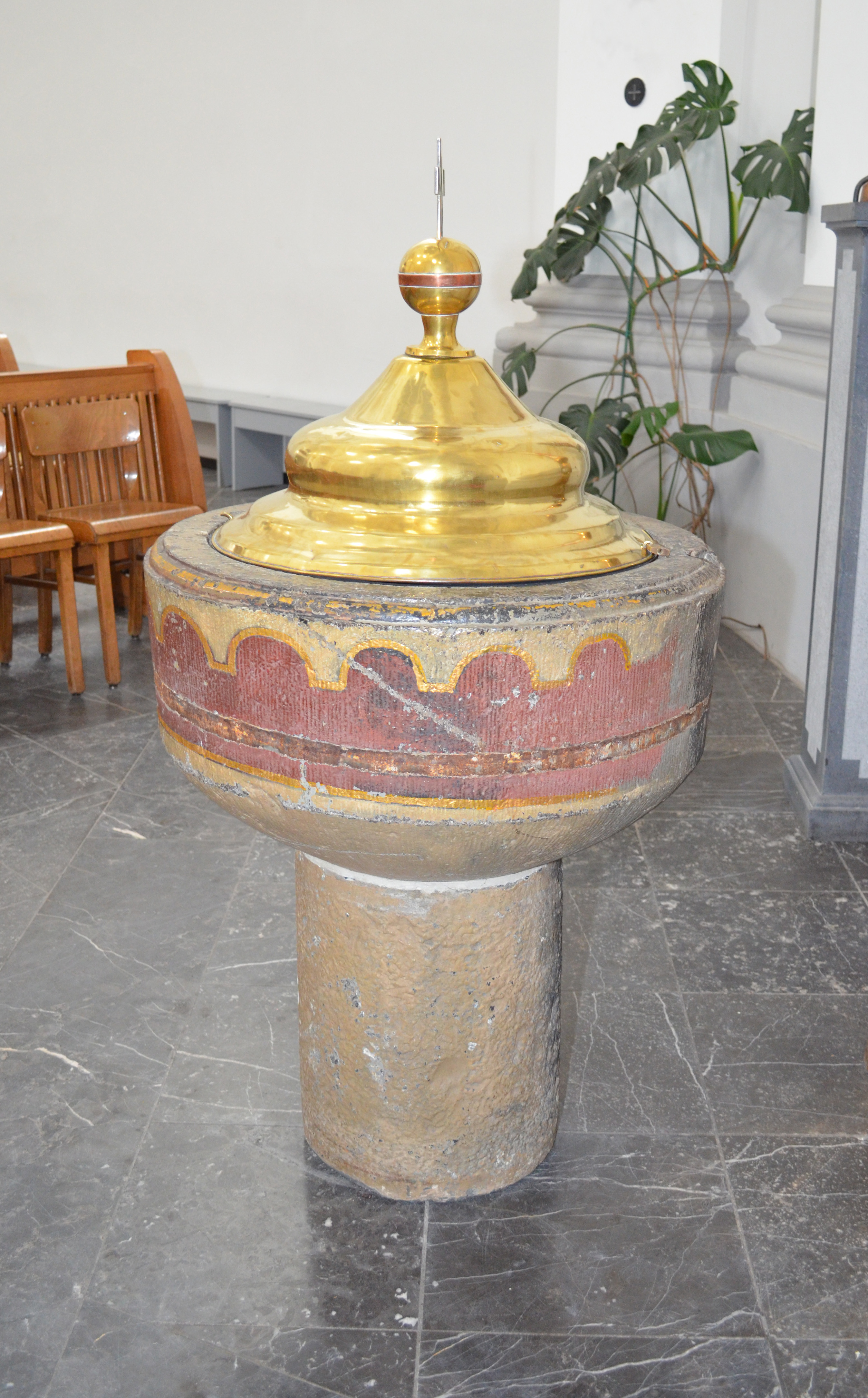 Taufstein in der Kirche St. Johann Baptist in Aachen-Burtscheid